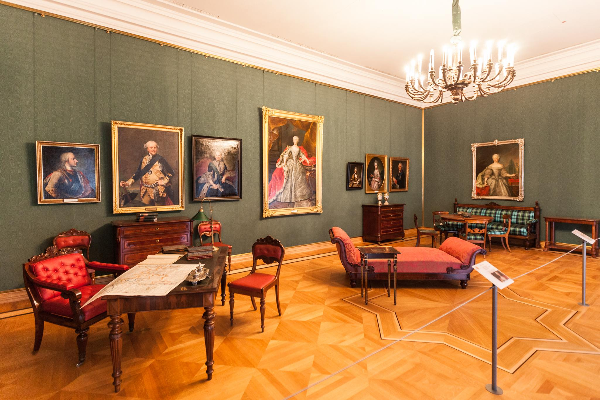 Das Bild zeigt das Arbeitszimmer im Schlossmuseum Braunschweig.